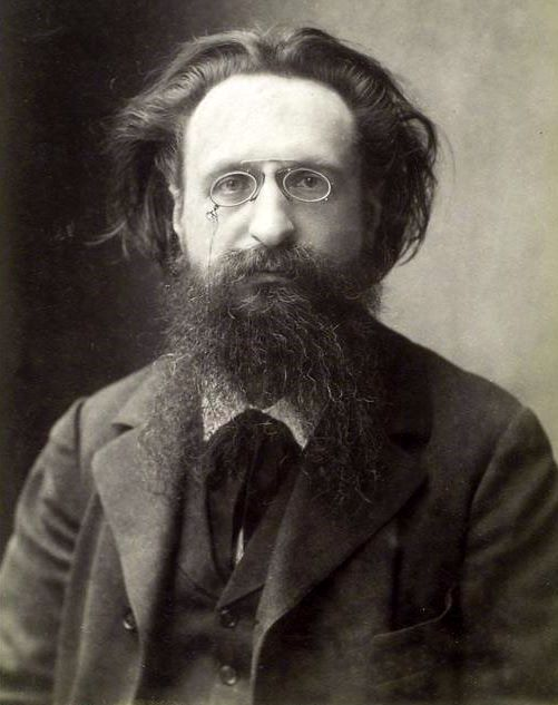 Jules (Jules Bazile) Guesde